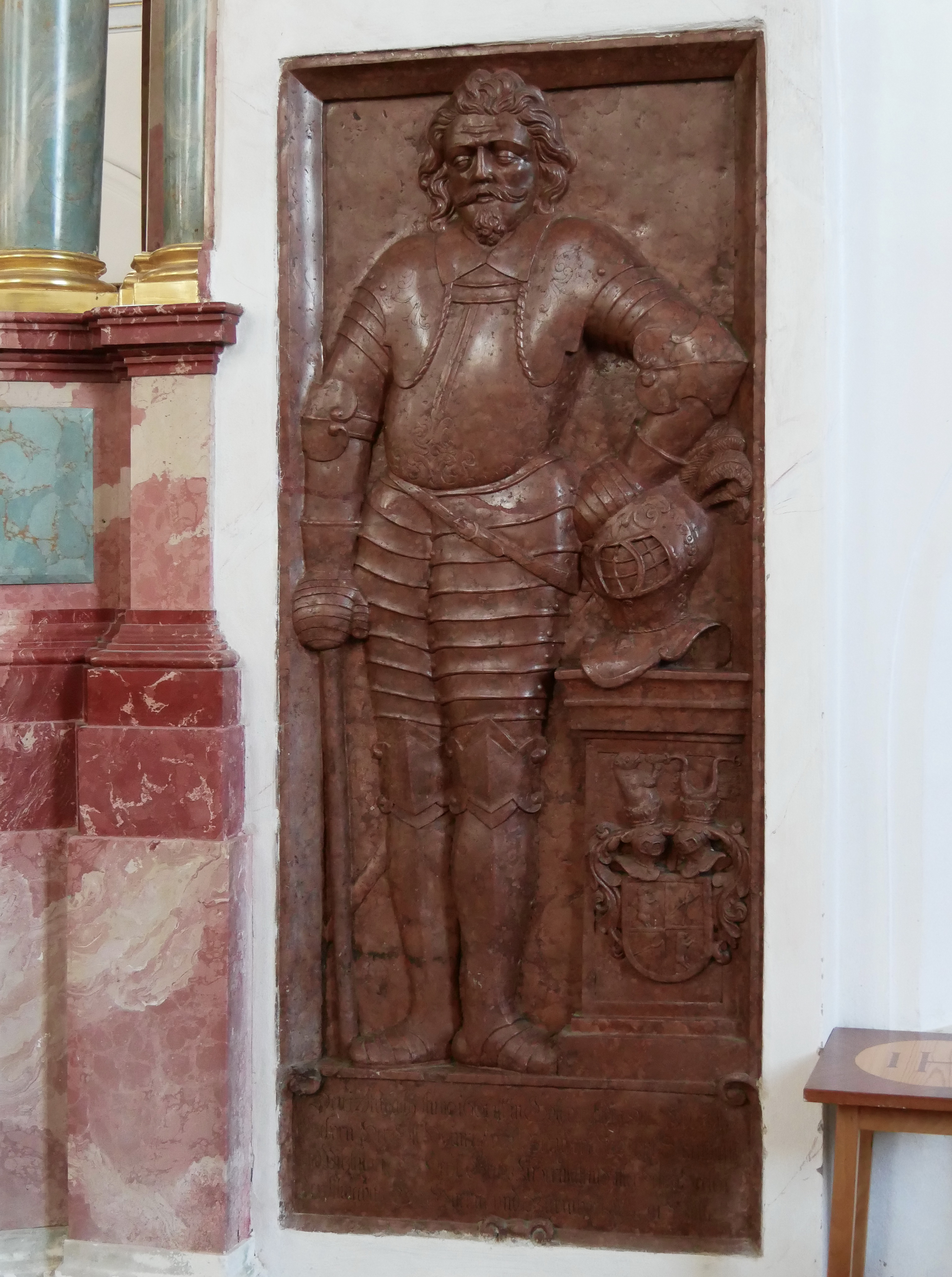 Pähl, St. Laurentius, Innenansicht. Epitaph des Heinrich von Berndorf (1586 - 1661) aus rotem Marmor am Chorbogen